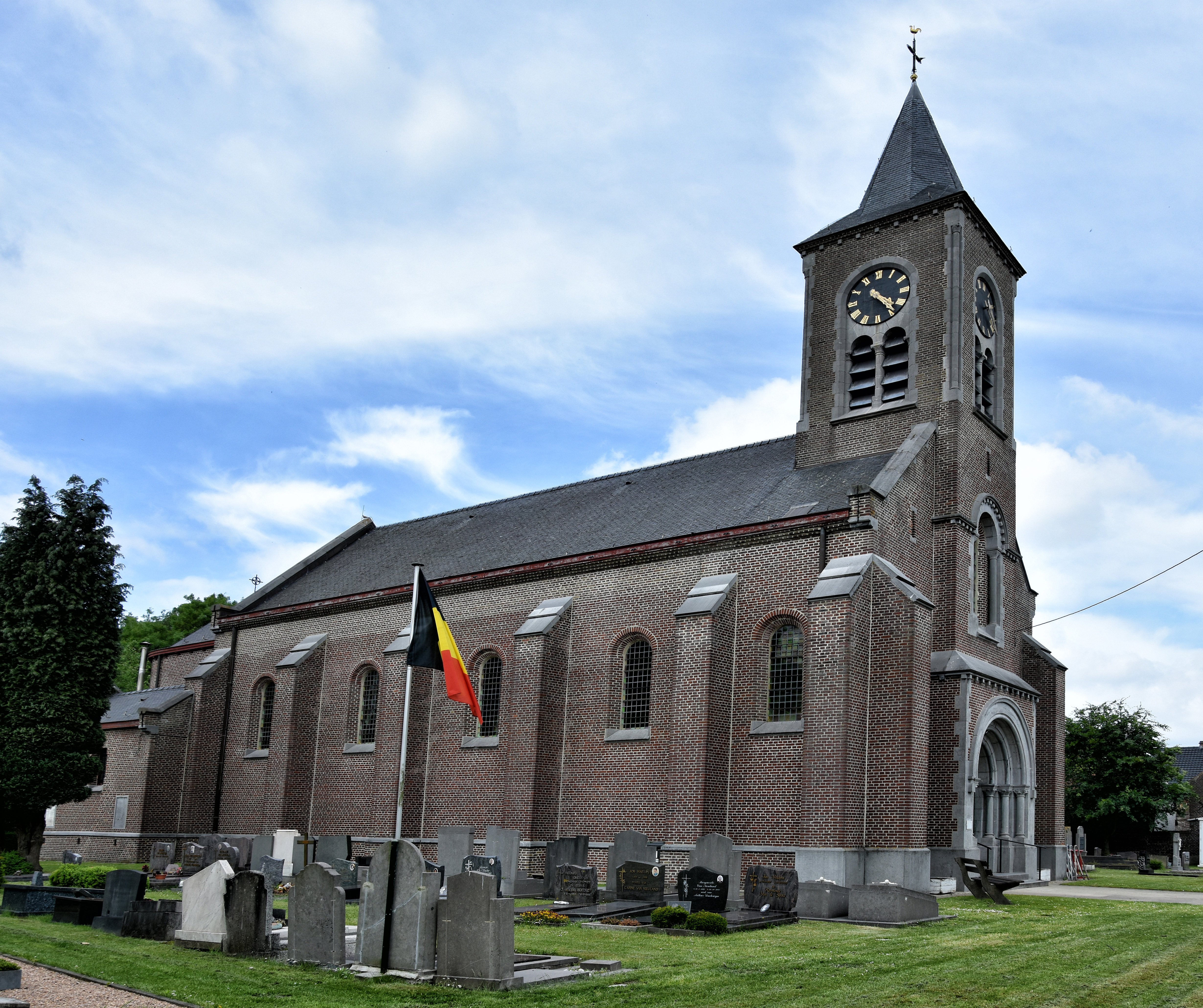 Mendonk, België - Sint-Baafskerk